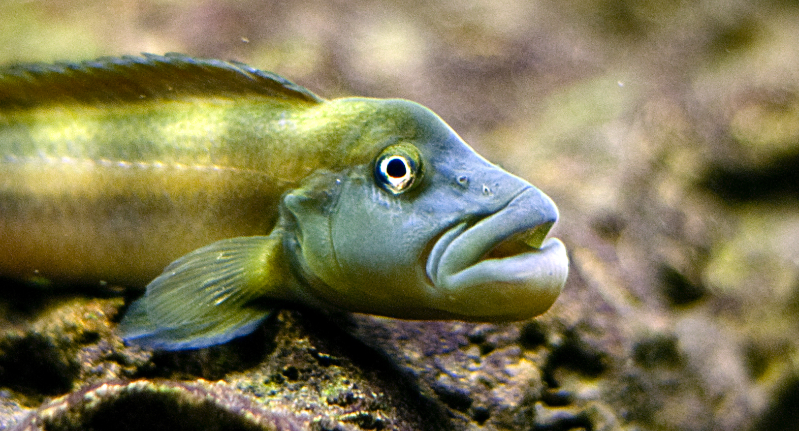 Steatocranus titanti Conocido vulgarmente con el nombre de "Bocas" es uno de los peces más tranquilos que conviven con otros cíclidos.